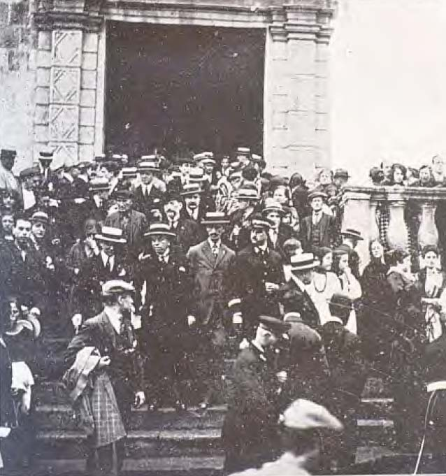 Homenatge de la Mancomunitat de Catalunya a la tomba de Rafael Casanova el 1922